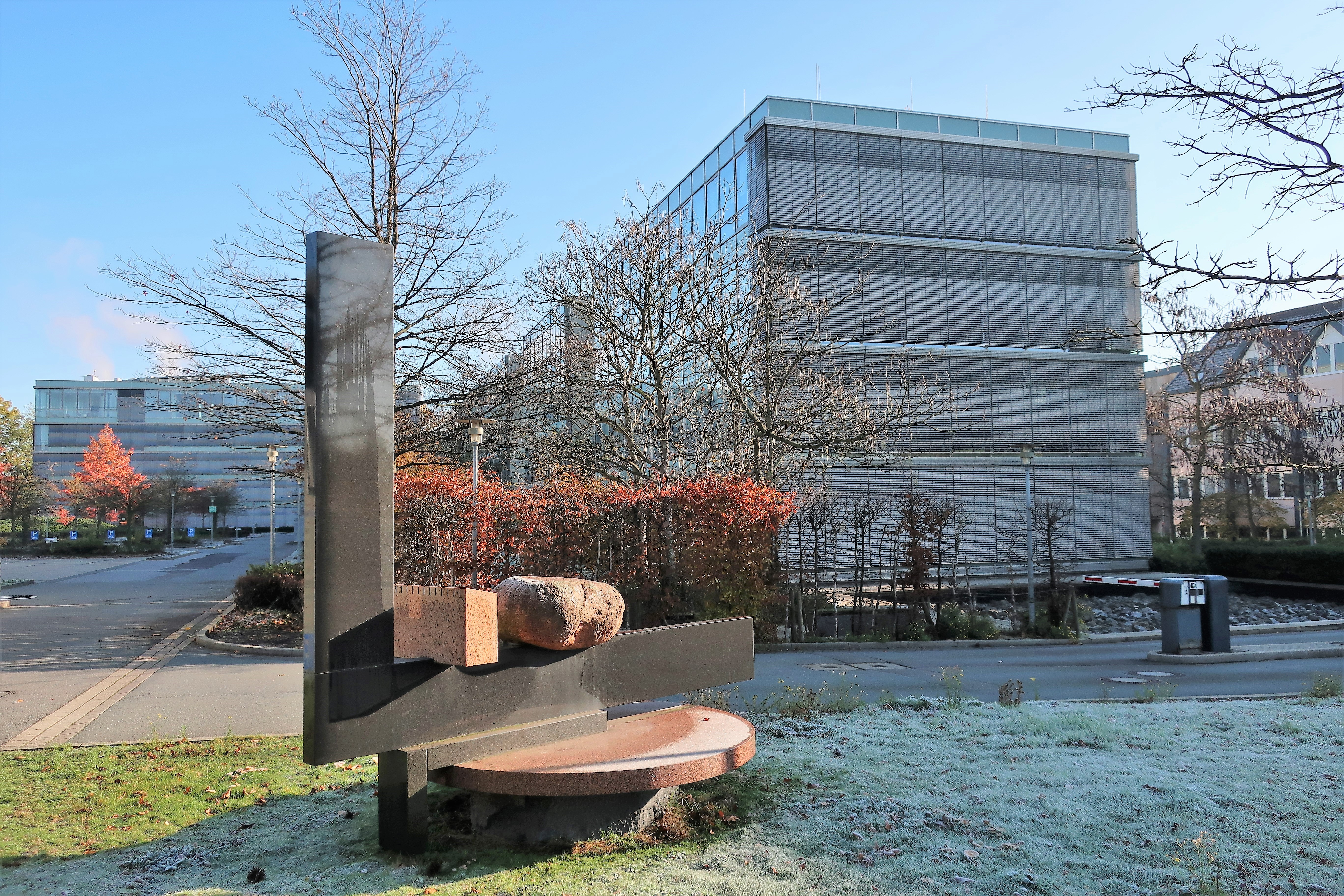 Douglas Holding-Gebäudekomplex in Hagen-Bathey, Kabeler Straße 4. Unternehmenszentralen der Juweliere CHRIST und der Hussel GmbH.